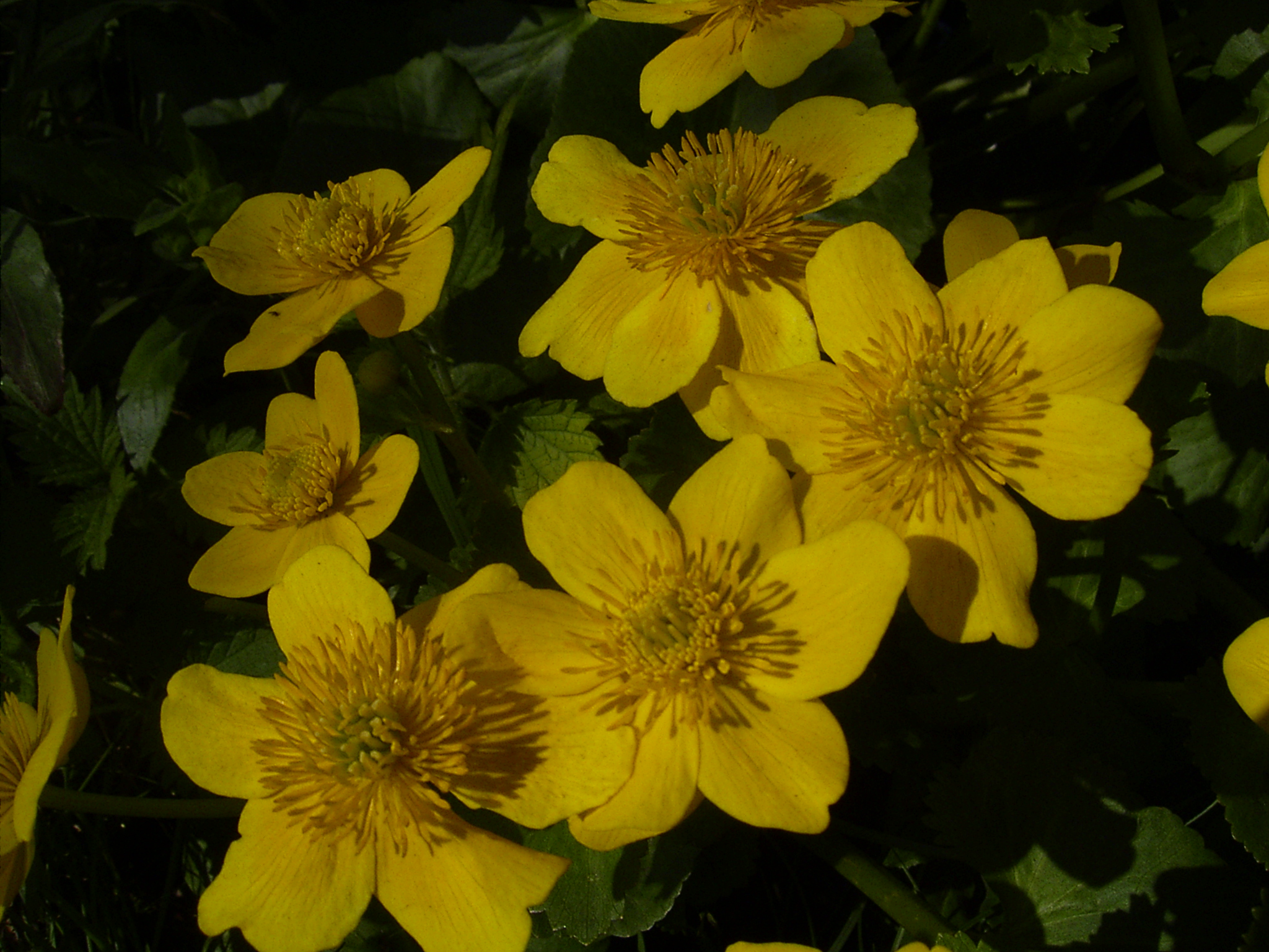 Caltha palustris, eigen foto, 20 april industriegebied goudse poort, gouda